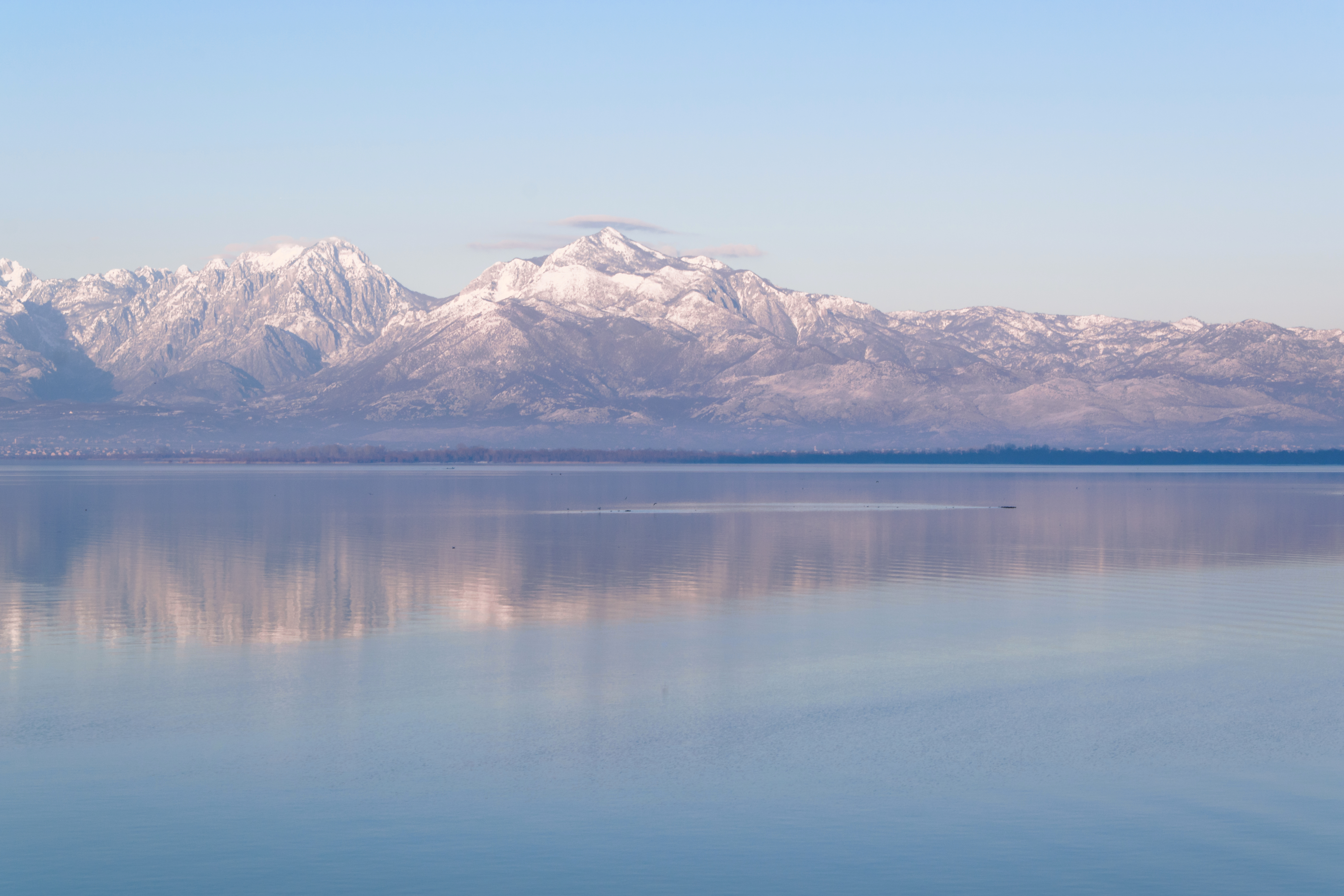 Liqeni i Shkodres, , Europe